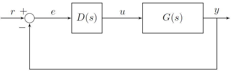 단일 되먹임 시스템을 나타내는 블록도